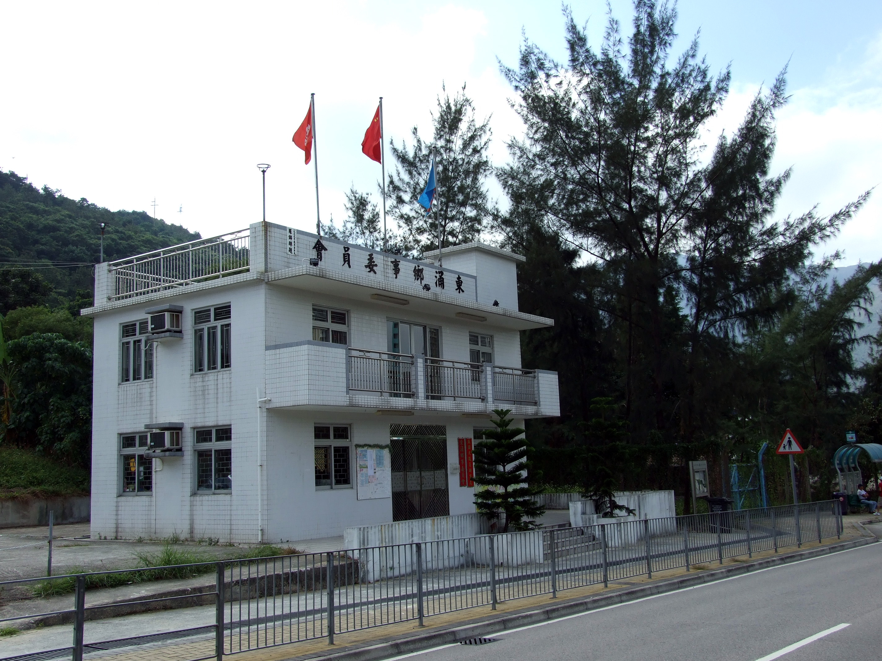 中文（香港）: 東涌鄉事委員會